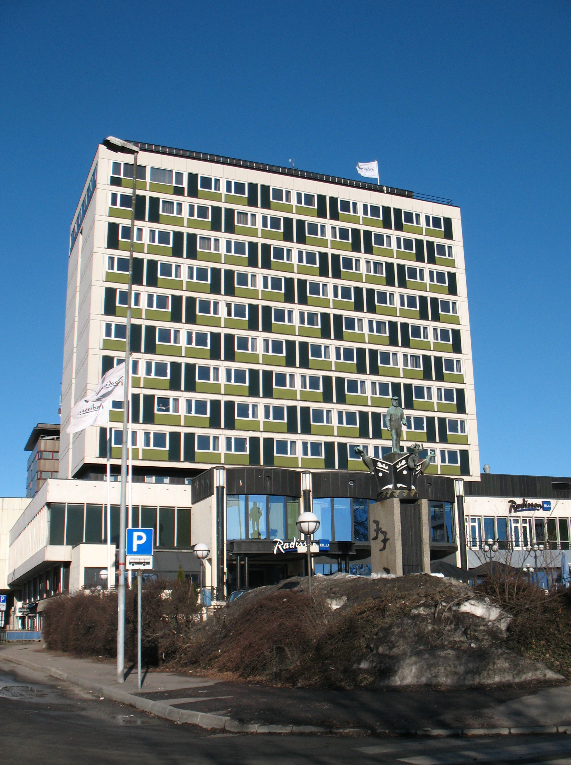 Caledonien hotell i Vestre Strandgate 7 i Kristiansand med skulpturen Seilskuteskipperen.